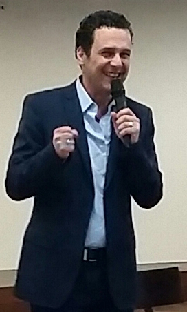 עדן הראל ועודד מנשה מנחים באירוע, טכניון, חיפה, 27 באפריל 2017